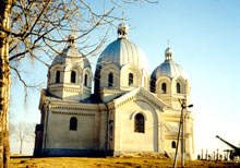 Церква у с. Миколаїв (Винницький деканат). 1903 р., архітектор В. Нагірний (1848—1921)